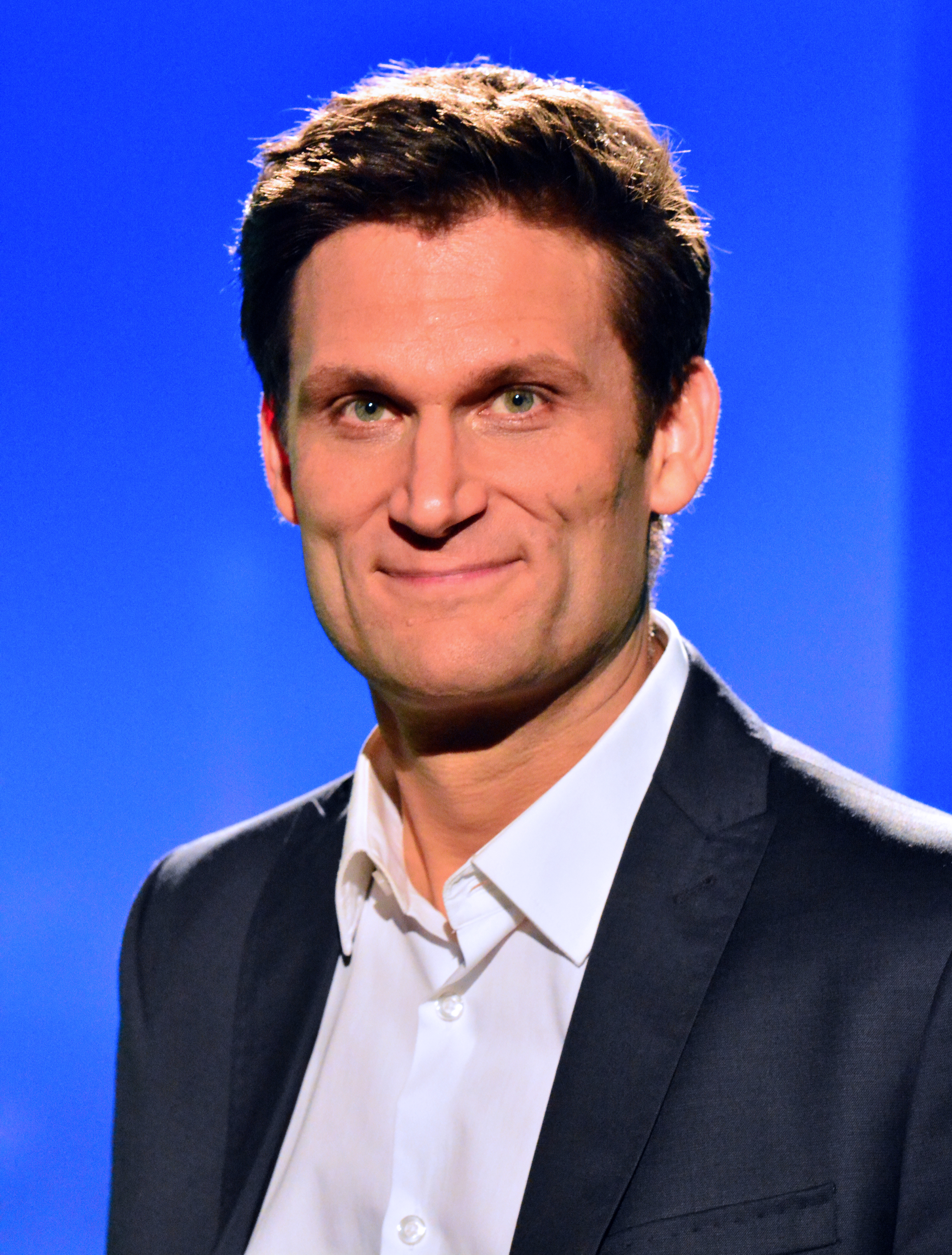 Christian Ehring bei einem Fototermin für die neugestaltete Satireshow extra 3 in den NDR-Fernsehstudios